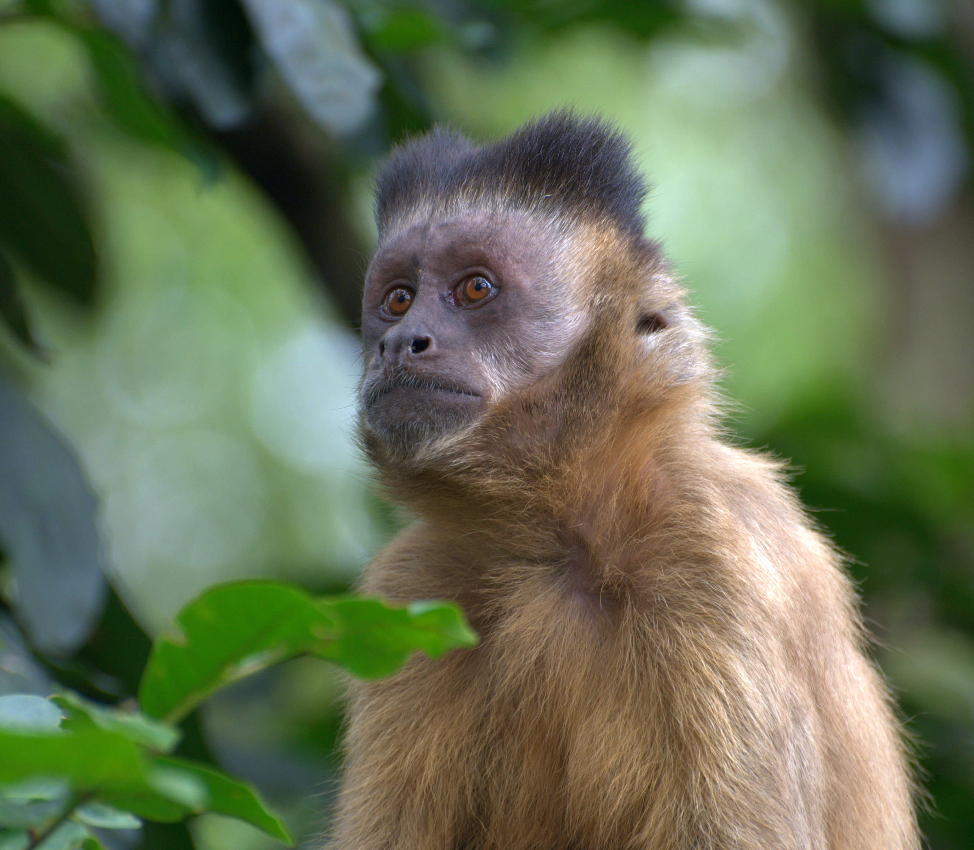 Parque Estadual do Tietê - São Paulo - Brasil